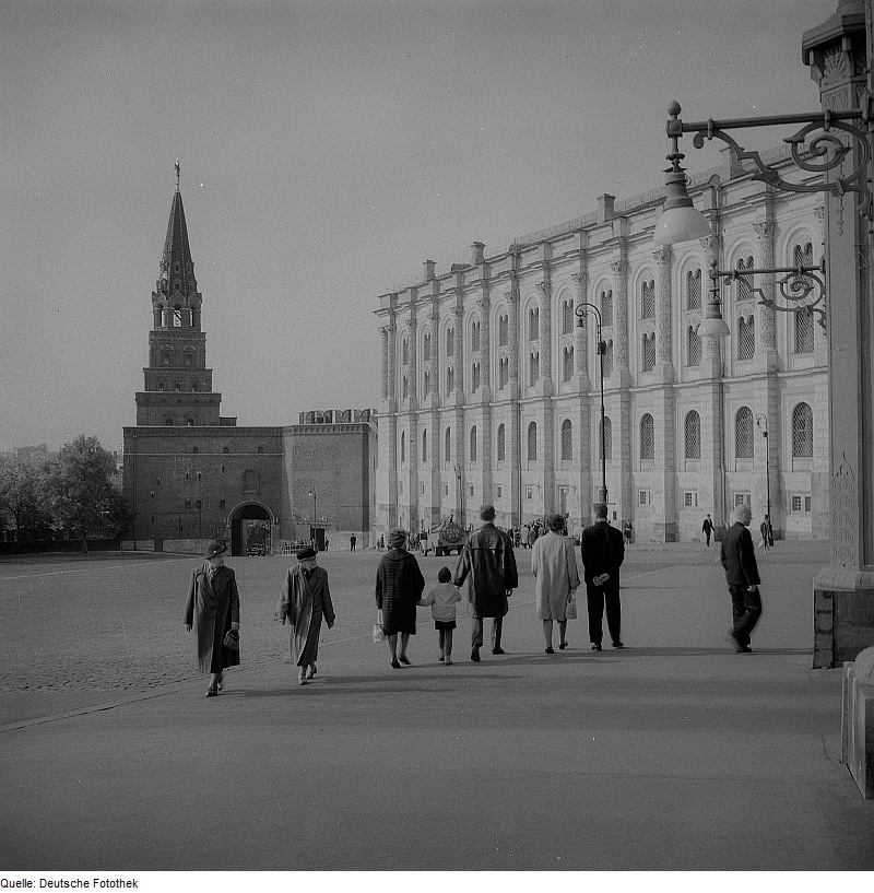 Original image description from the Deutsche Fotothek Moskau. Kreml, Borowizki-Turm und Rüstkkammer